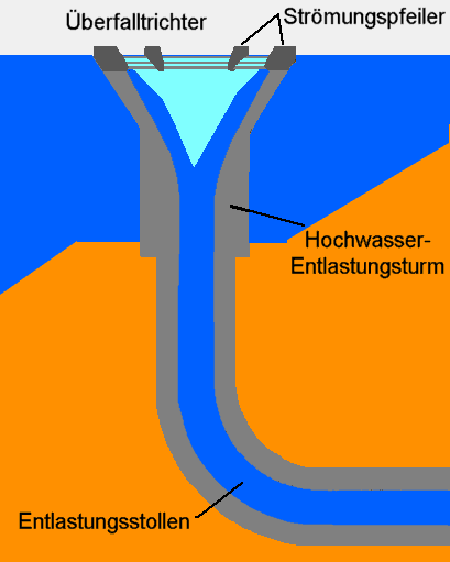 Entlastung Dhünntalsperre, Grafik Hochwasserentlastungsturm mit Überfalltrichter